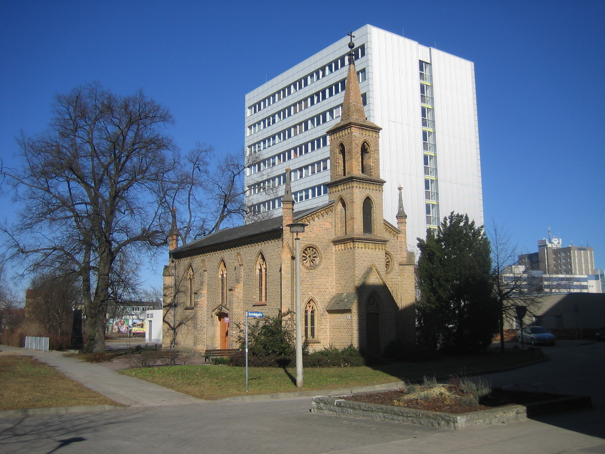 Buttelkapelle (St.-Thomas-Kirche) in Neubrandenburg, Mecklenburg-Vorpommern